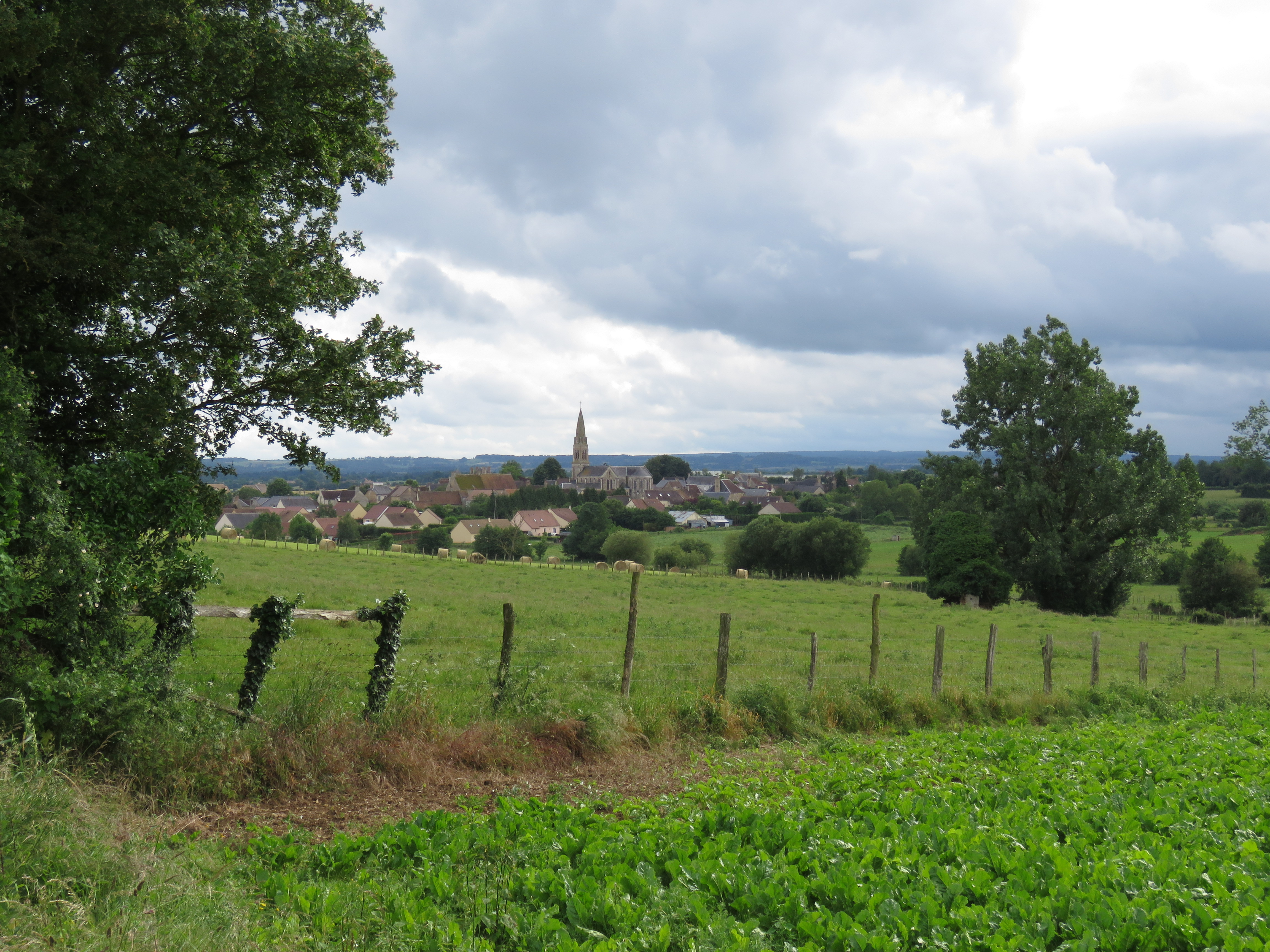 Vue du village depuis les Blutteries.